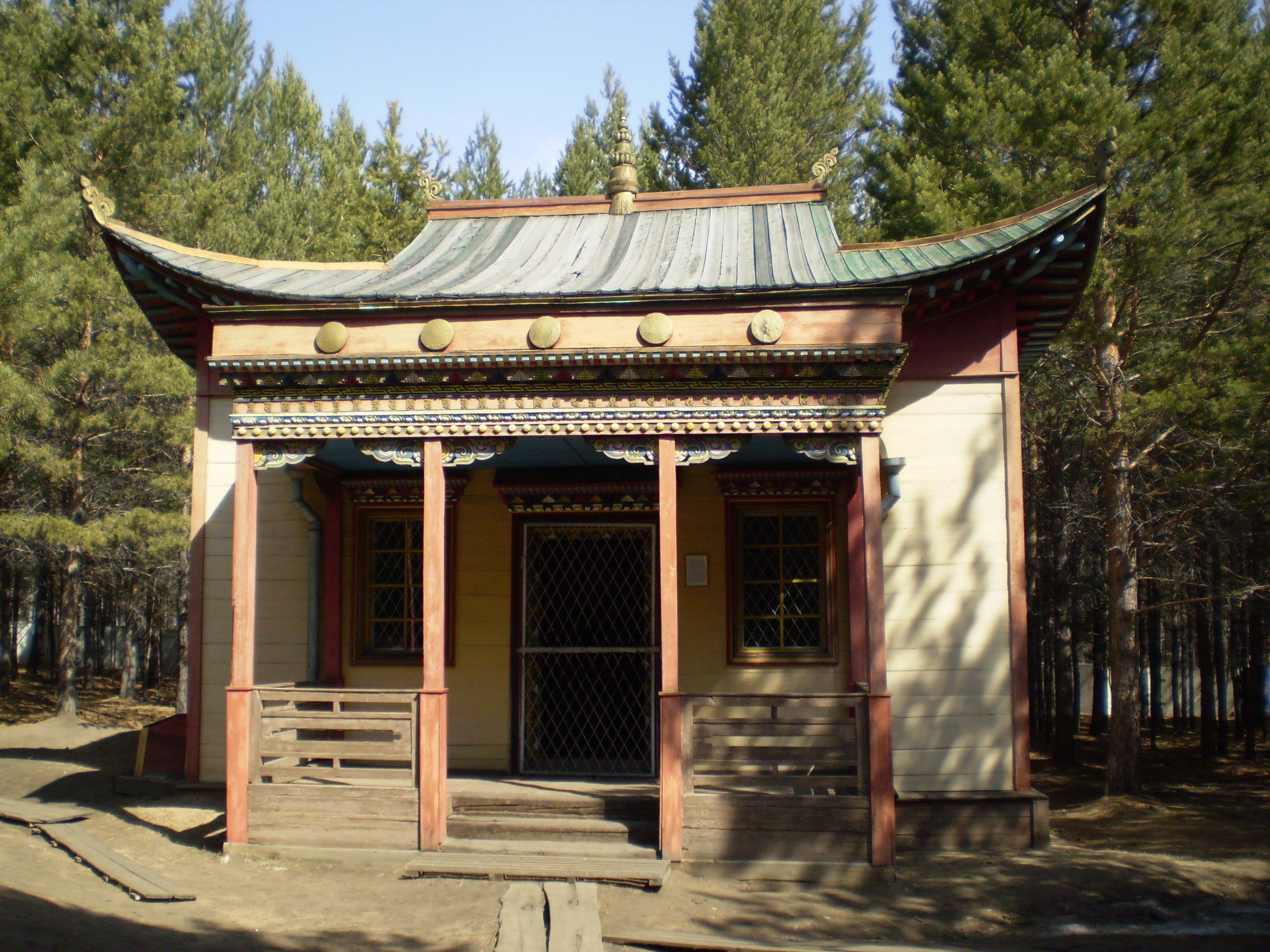 Дуагн "Деваджин". Гусиноозёрск, вторая половина XIX века